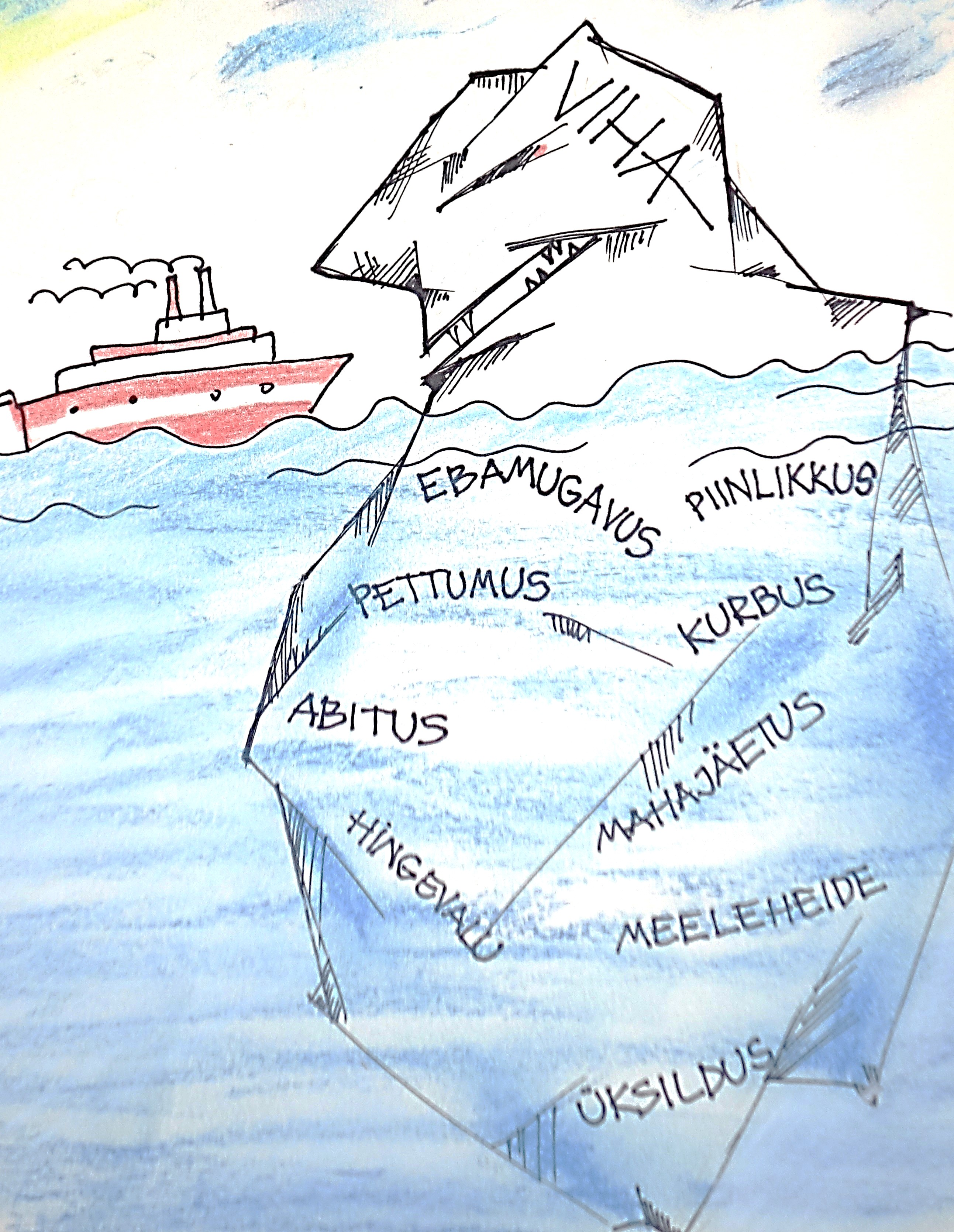 Suhtlemisel väljendatud viha aluseks olevate tunnete illustratsioon, aluseks T.Gordoni materjalid (idee).